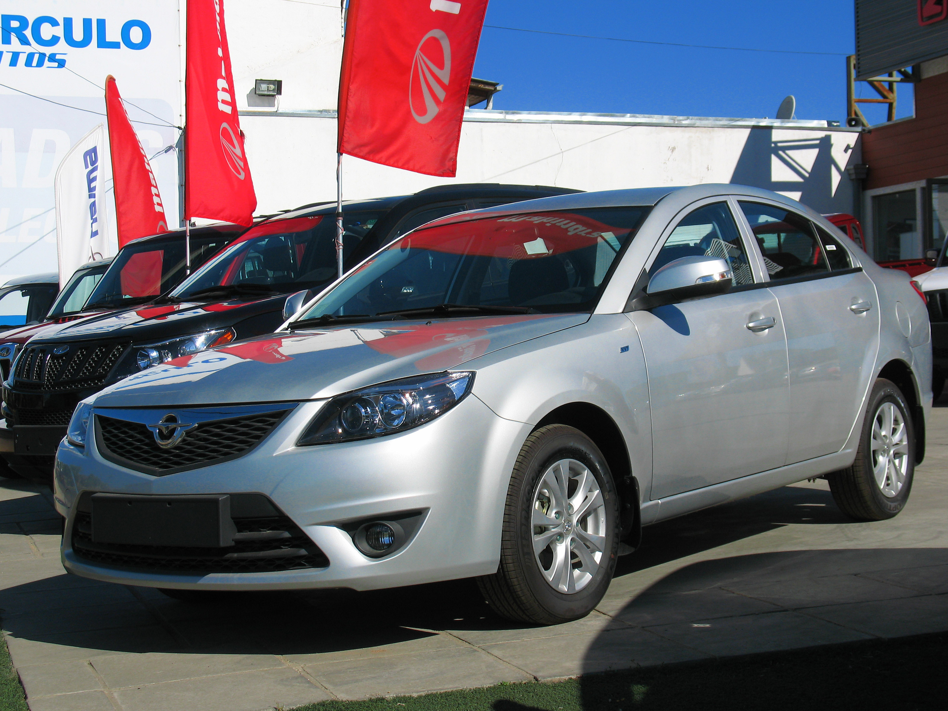 Haima 3 1.6 DX Sedan 2014